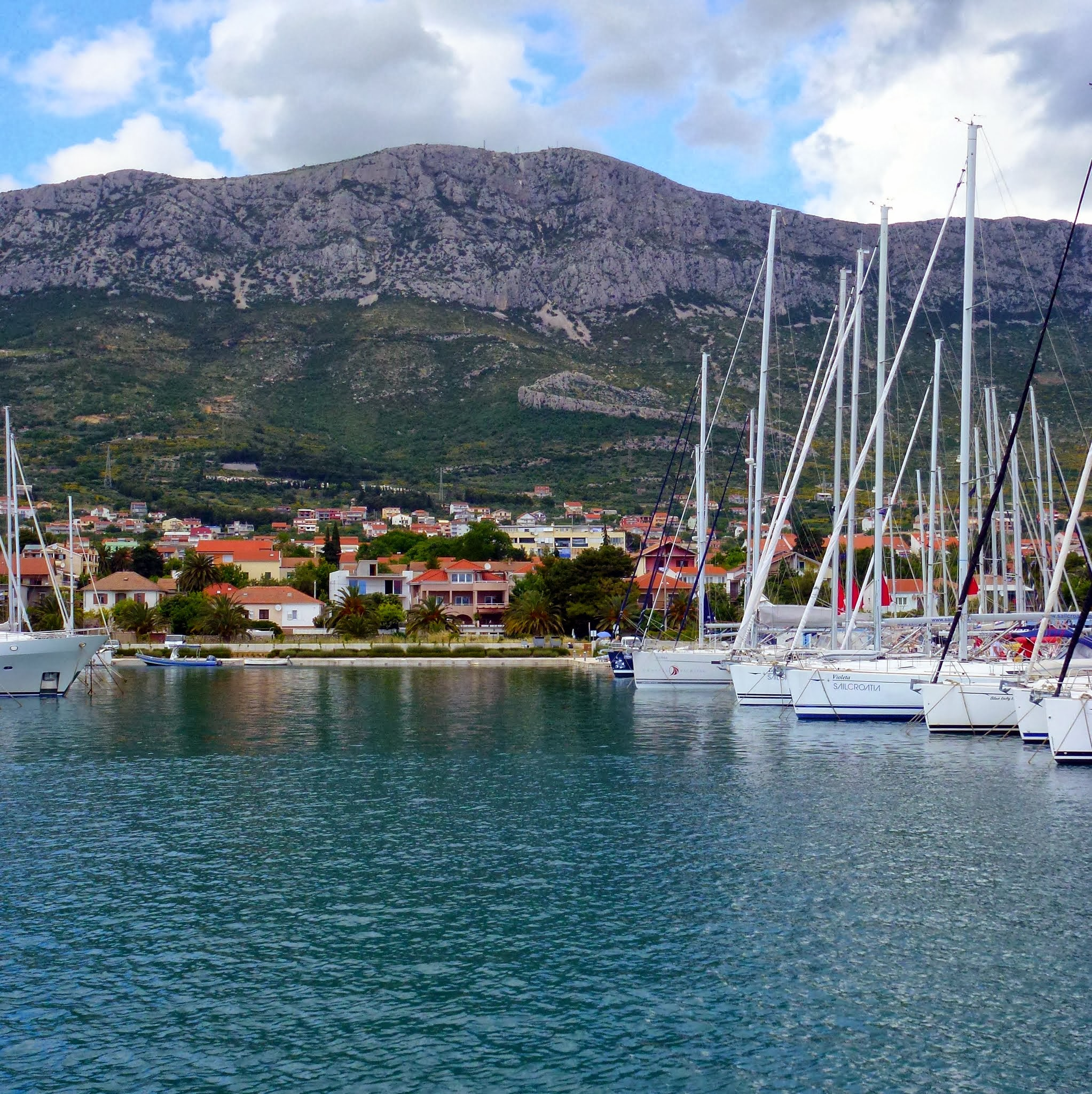 Castell'Abbadessa, Croatia